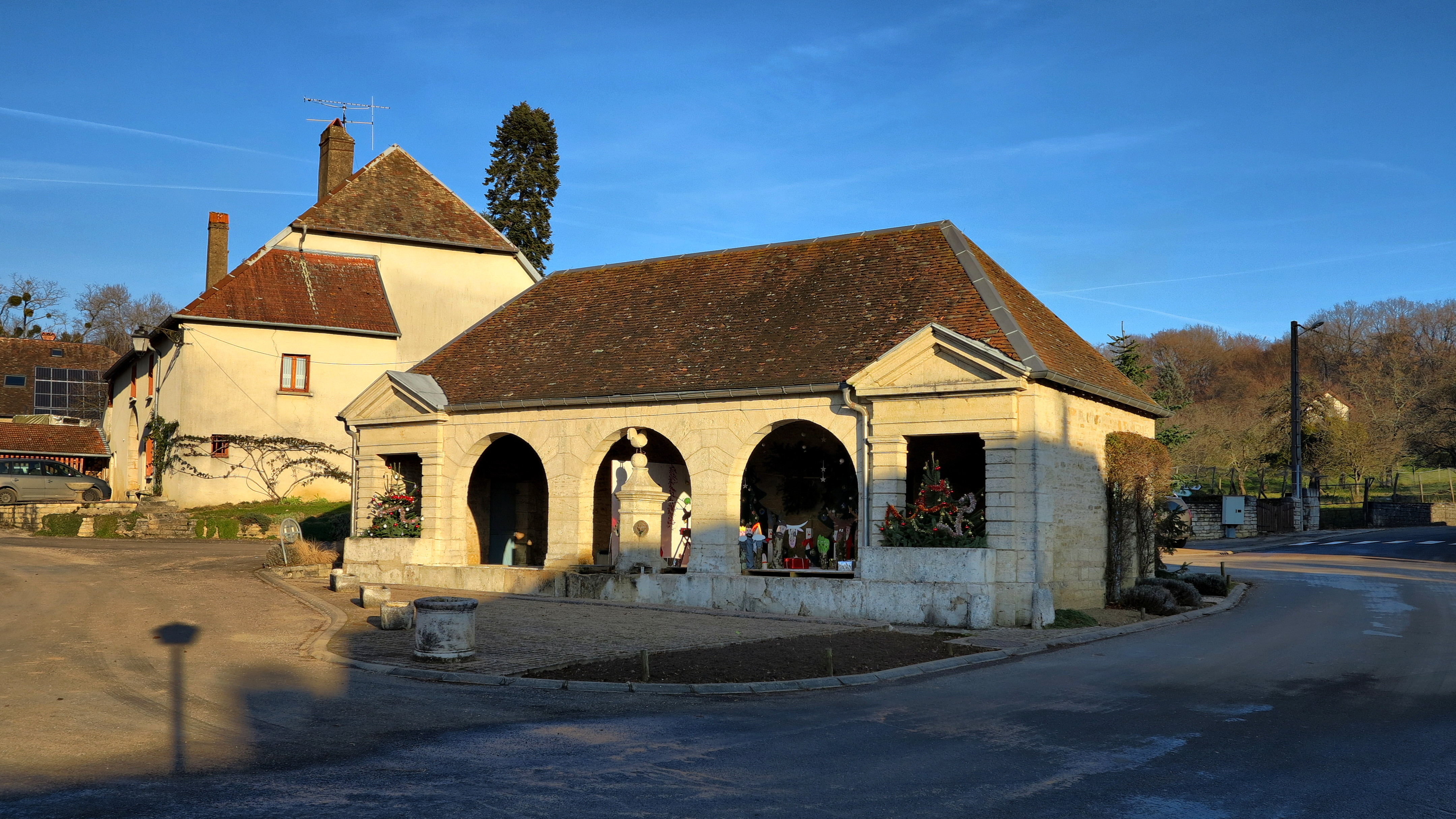 La fontaine-lavoir-abreuvoir